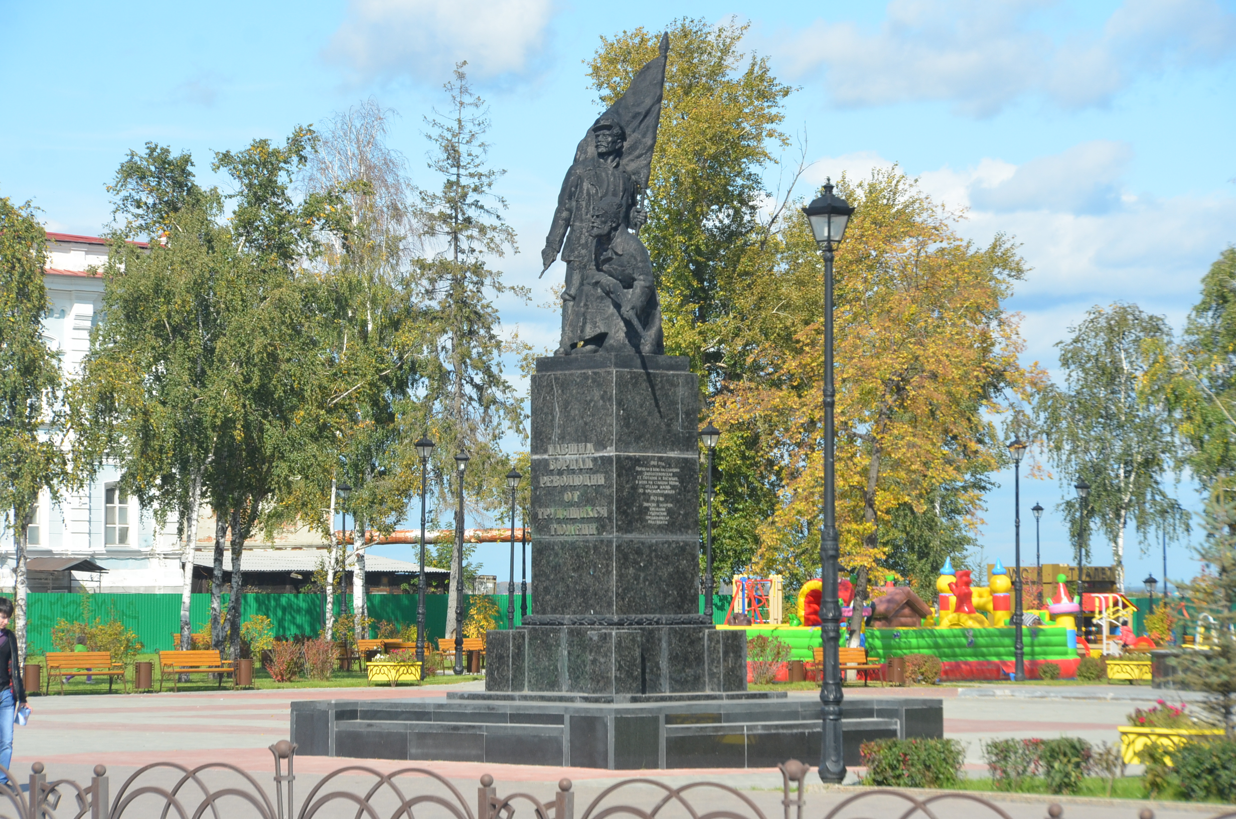 Памятник борцам революции: площадь Борцов революции, Тюмень, Тюменская область